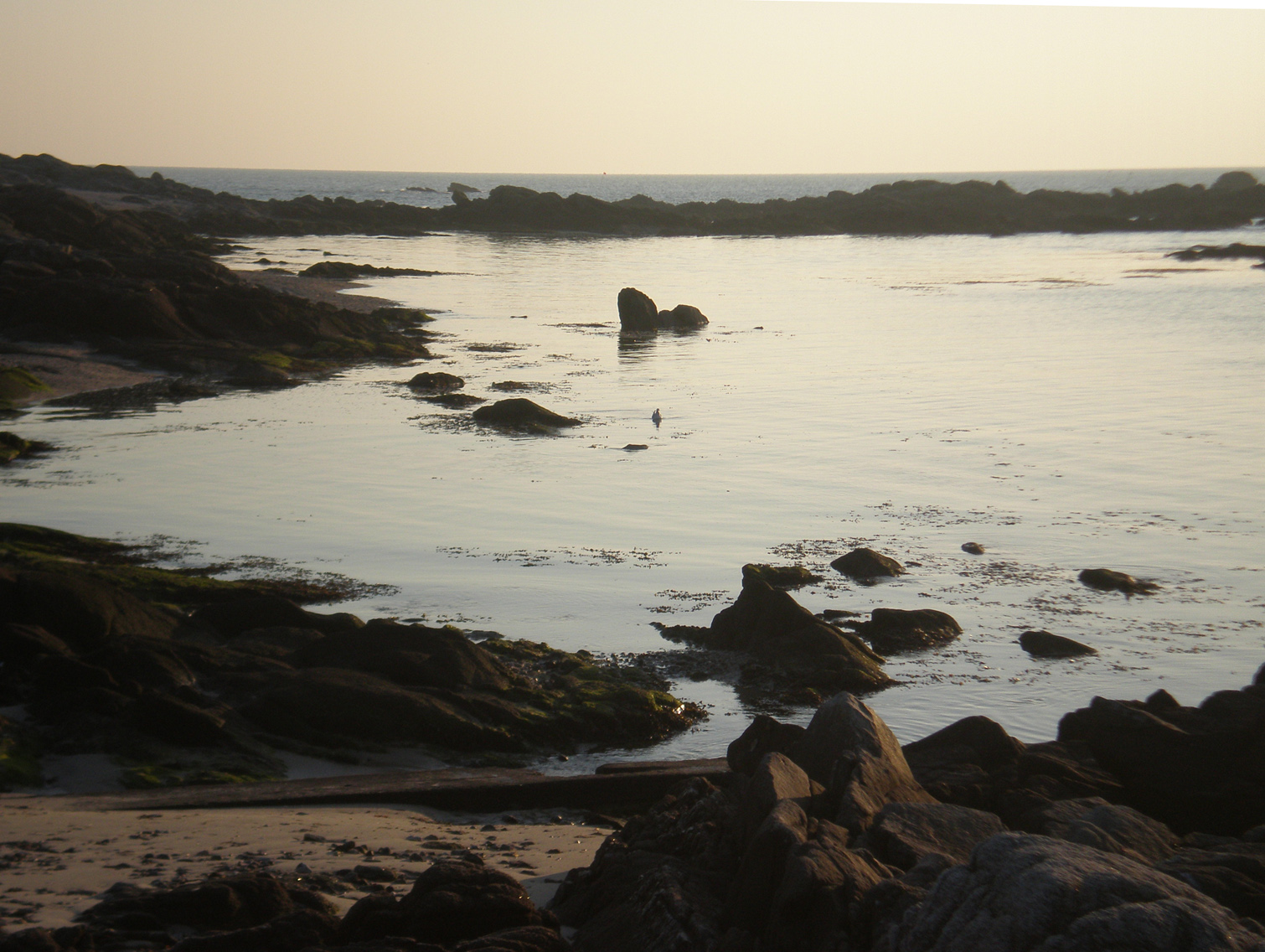 Retenue d'eau sur le lieu-dit « Port aux rocs » au Croisic